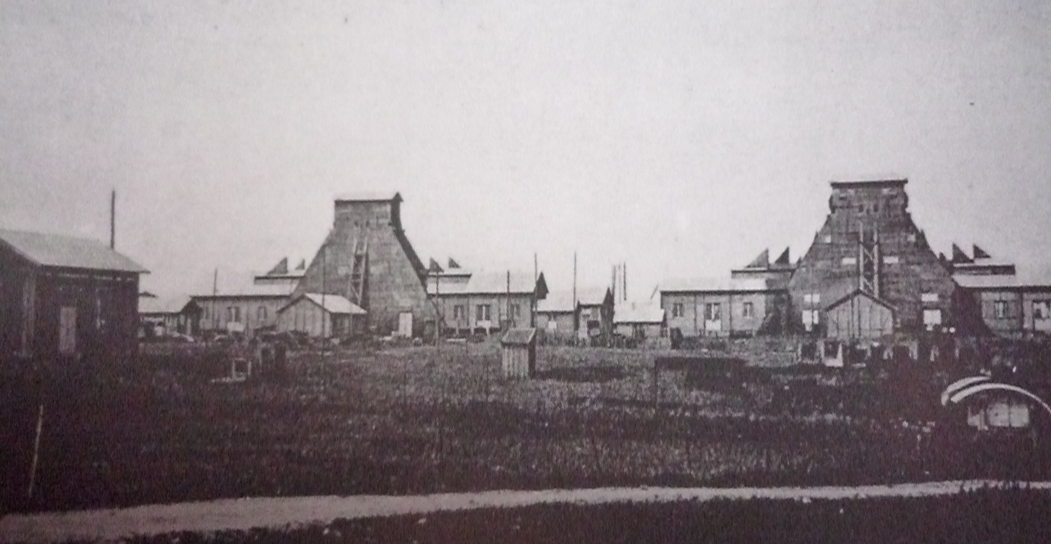 La Fosse n° 1 - 1 bis de la Compagnie des mines de Vimy-Fresnoy était un charbonnage constitué de deux puits situé à Vimy, Pas-de-Calais, Nord-Pas-de-Calais, France.